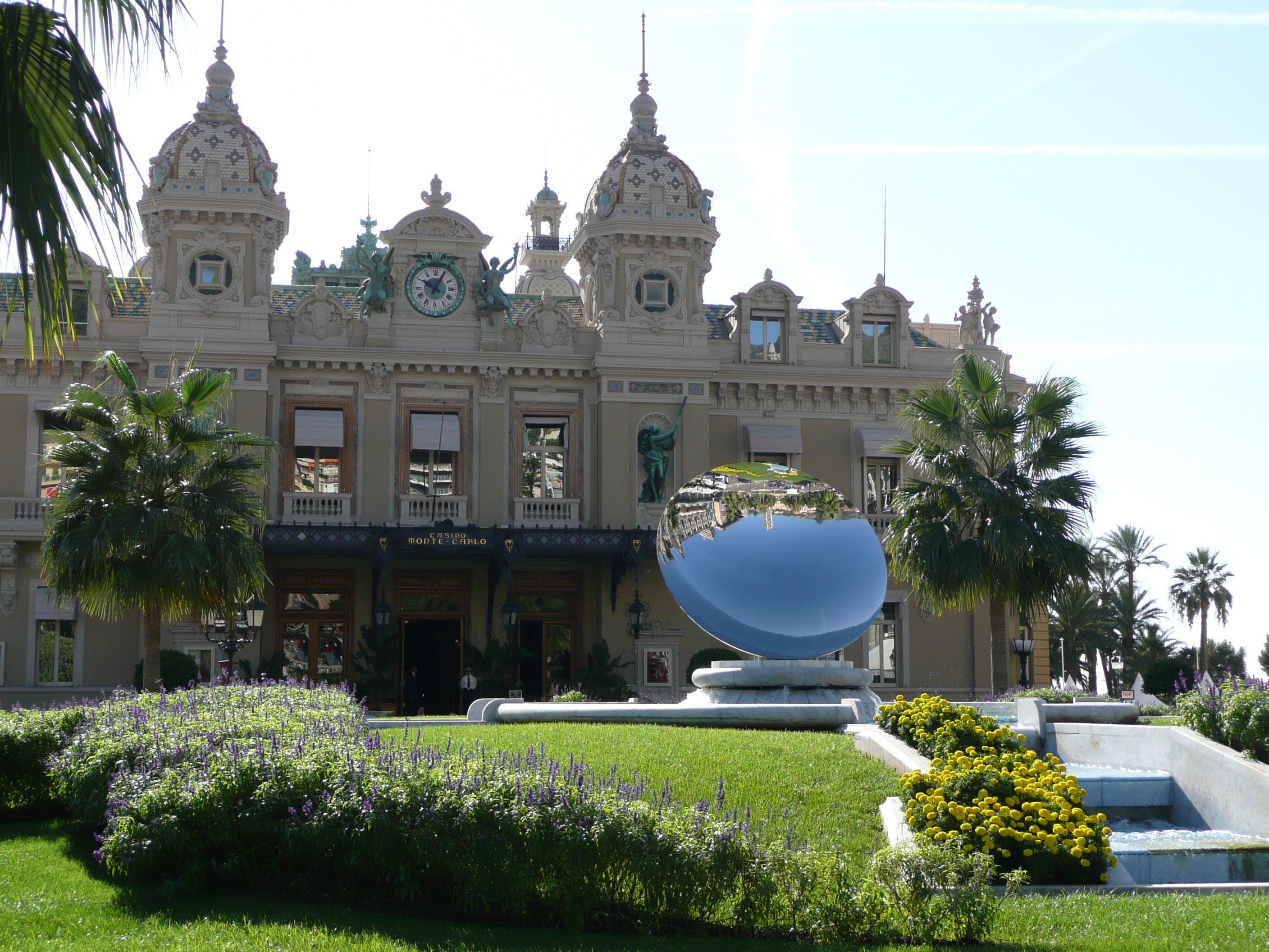 Monaco